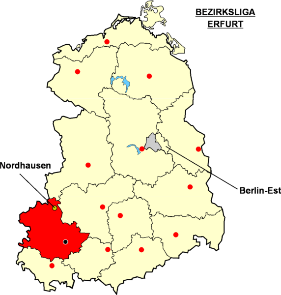 Localisation de Nordhausen dans la "Bezirksliga Erfurt" à l'époque de la RDA Catégorie:Logo de clubs de football - Allemagne